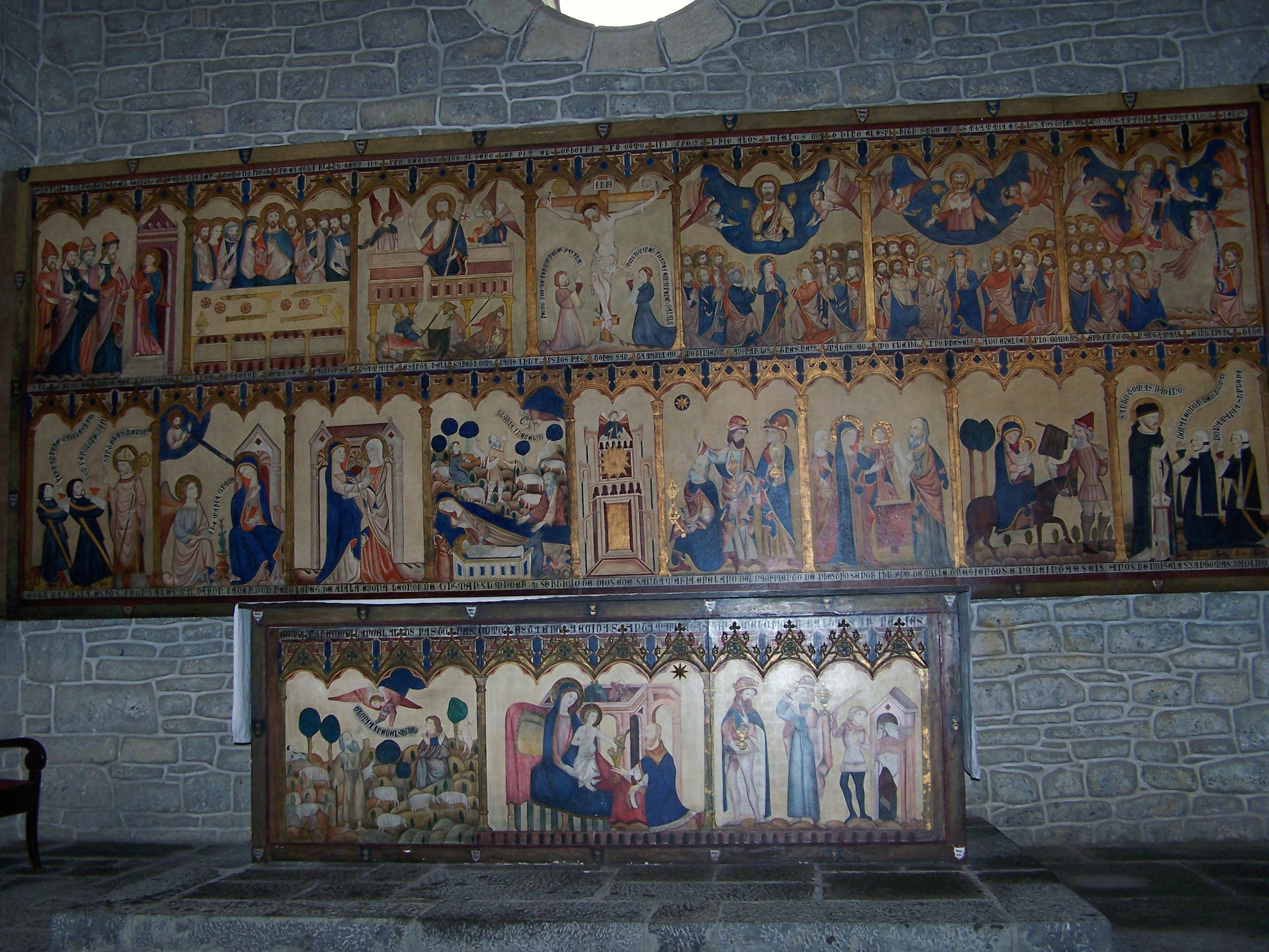 Adatseko Ama Birjinaren Kapera - Erretaula